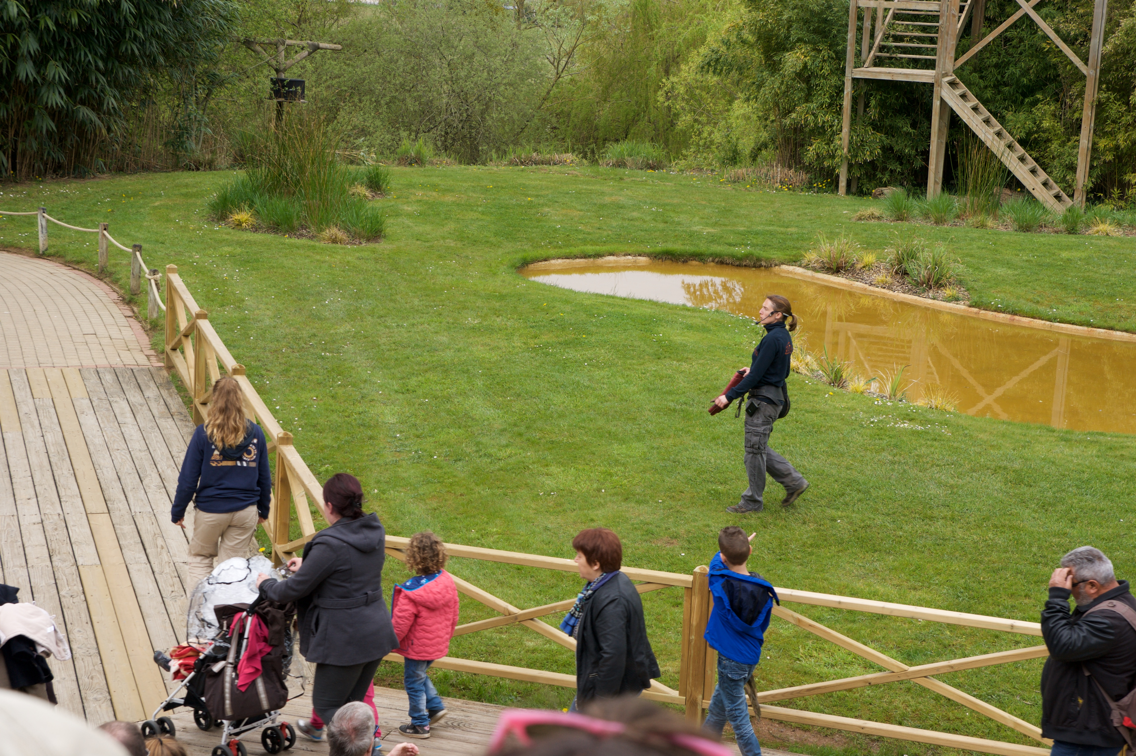 tournage de la saison 5 de l'émission Une saison au zoo